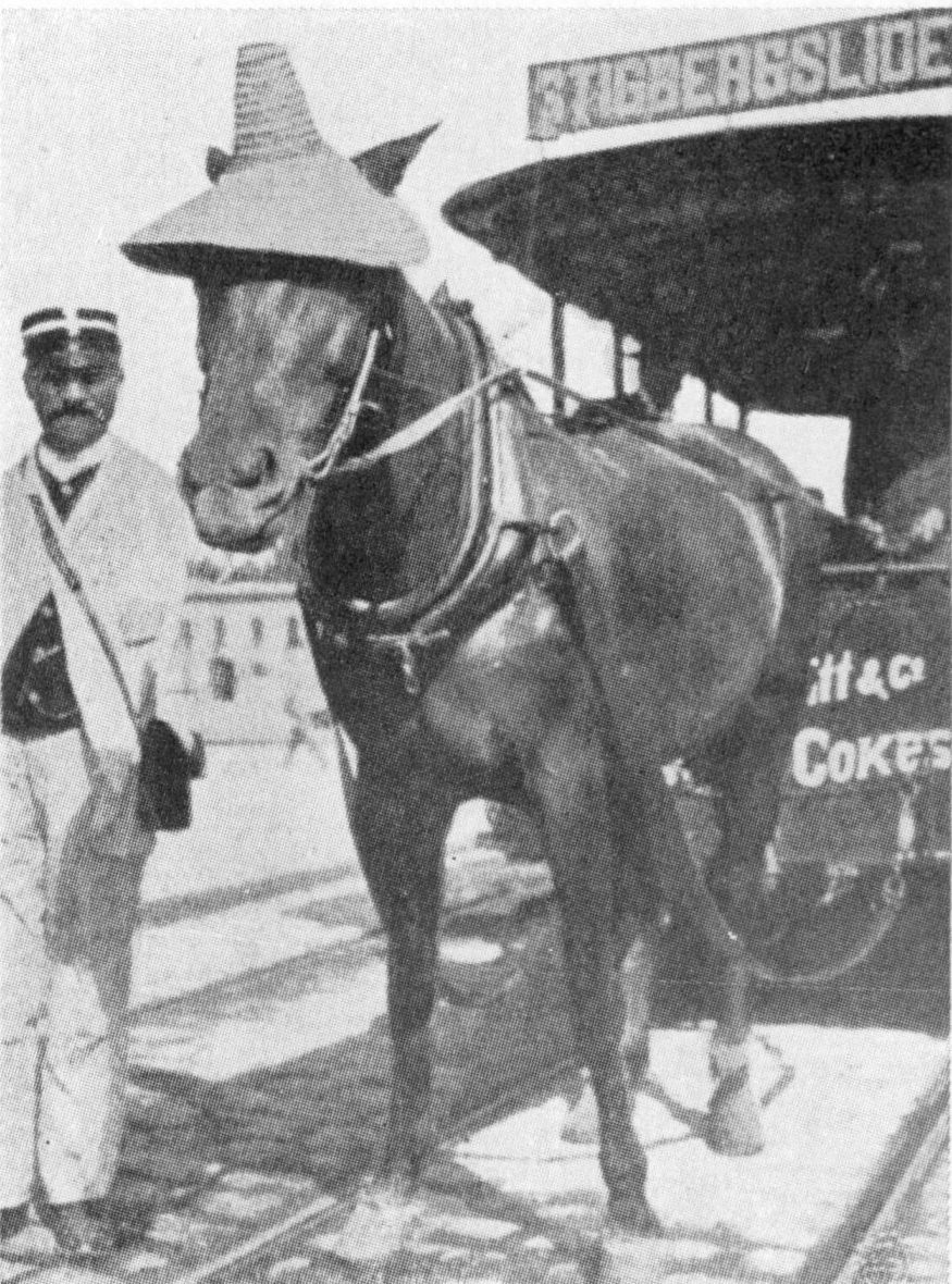 Spårvagnshäst i Göteborg iförd "Edströms-hatt", den varma sommaren 1901. Initiativtagare till hatten var Ruth Randall Edström, vars make Sigfrid Edström då var direktör för Göteborgs spårvägar.